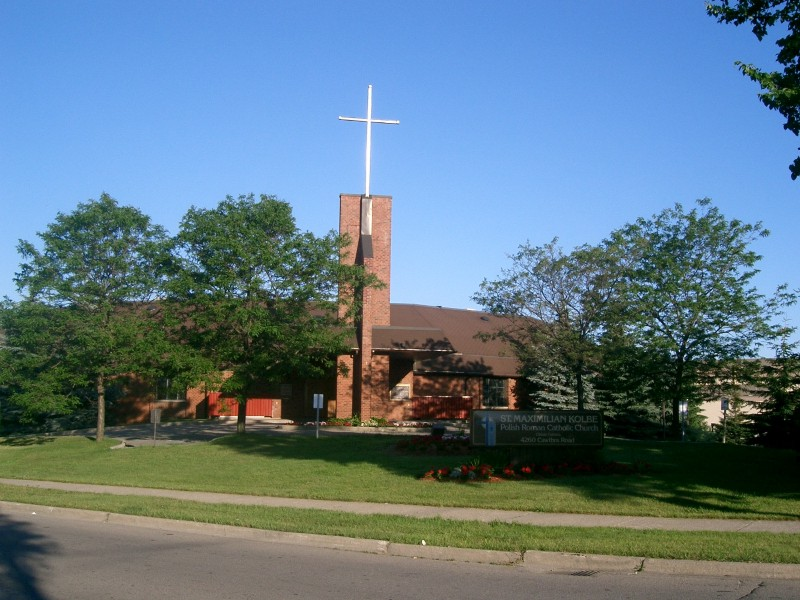 Mississauga, Polski kosciol sw. Maximiliana